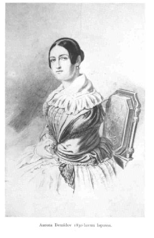 Aurora Karamzin (born Aurora Stjernvall)